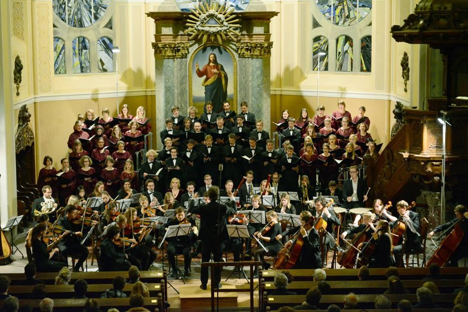 Københavns Universitets Symfoniorkester sammen med Universitätschor Dresden spiller koncert i Dresden